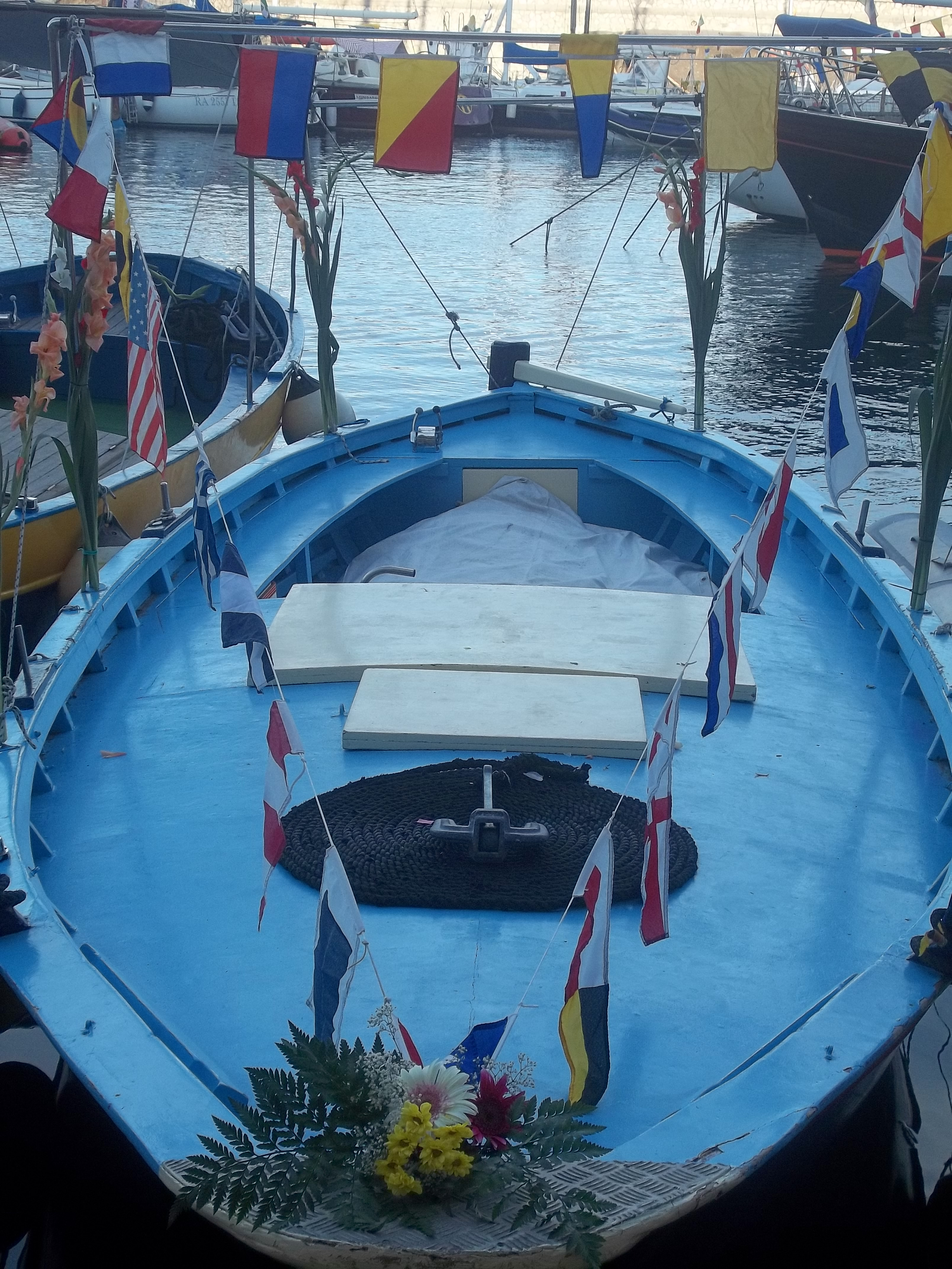 Santa Candida 2011